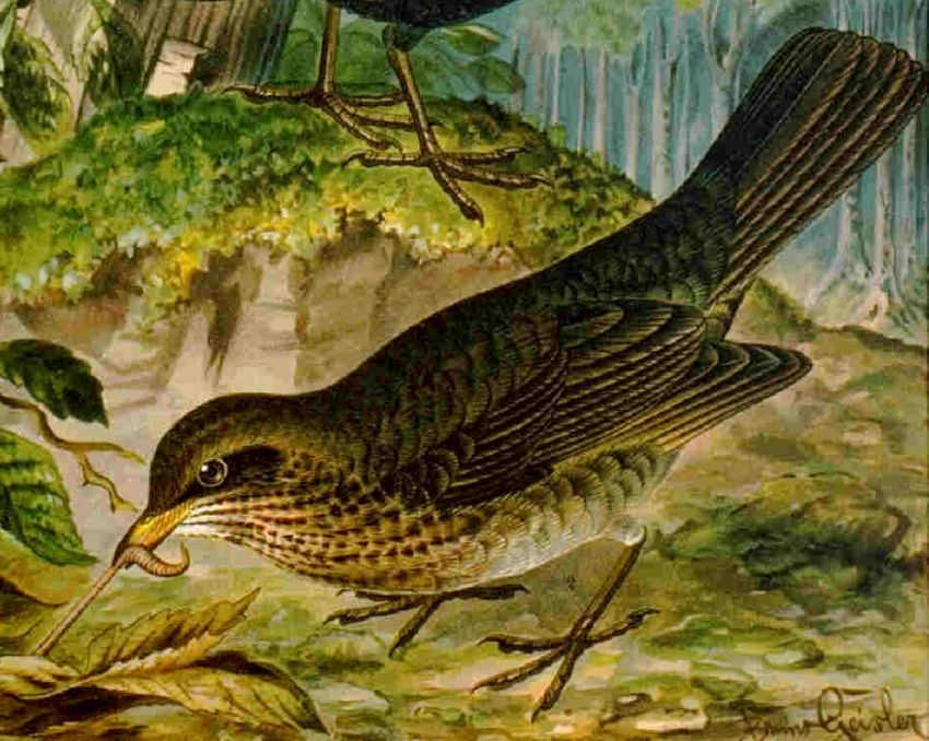 Beschreibung: Amsel ♀ (Turdus merula) Quelle: aus: Naumann, Naturgeschichte der Vögel Mitteleuropas: Band I, Tafel 18 - Gera, 1905, - zugeschnitten und etwas verkleinert Lizenzstatus: Public Domain